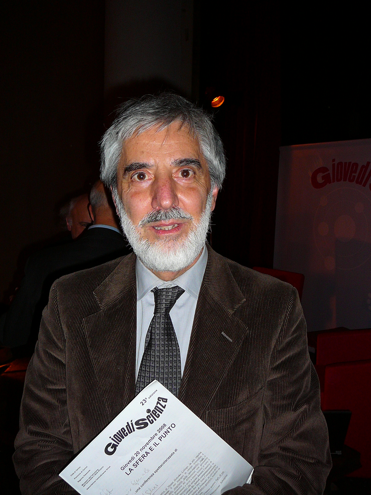 Piero Bianucci, durante la giornata inaugurale della 23. edizione di Giovedì Scienza